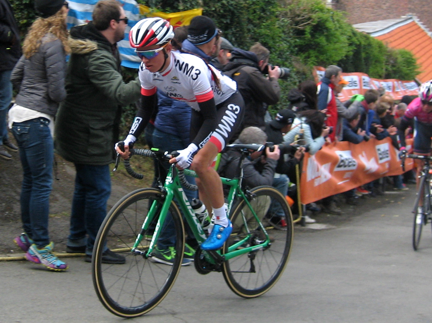 Kasia Niewiadoma (WM3) in de Waalse Pijl 2017